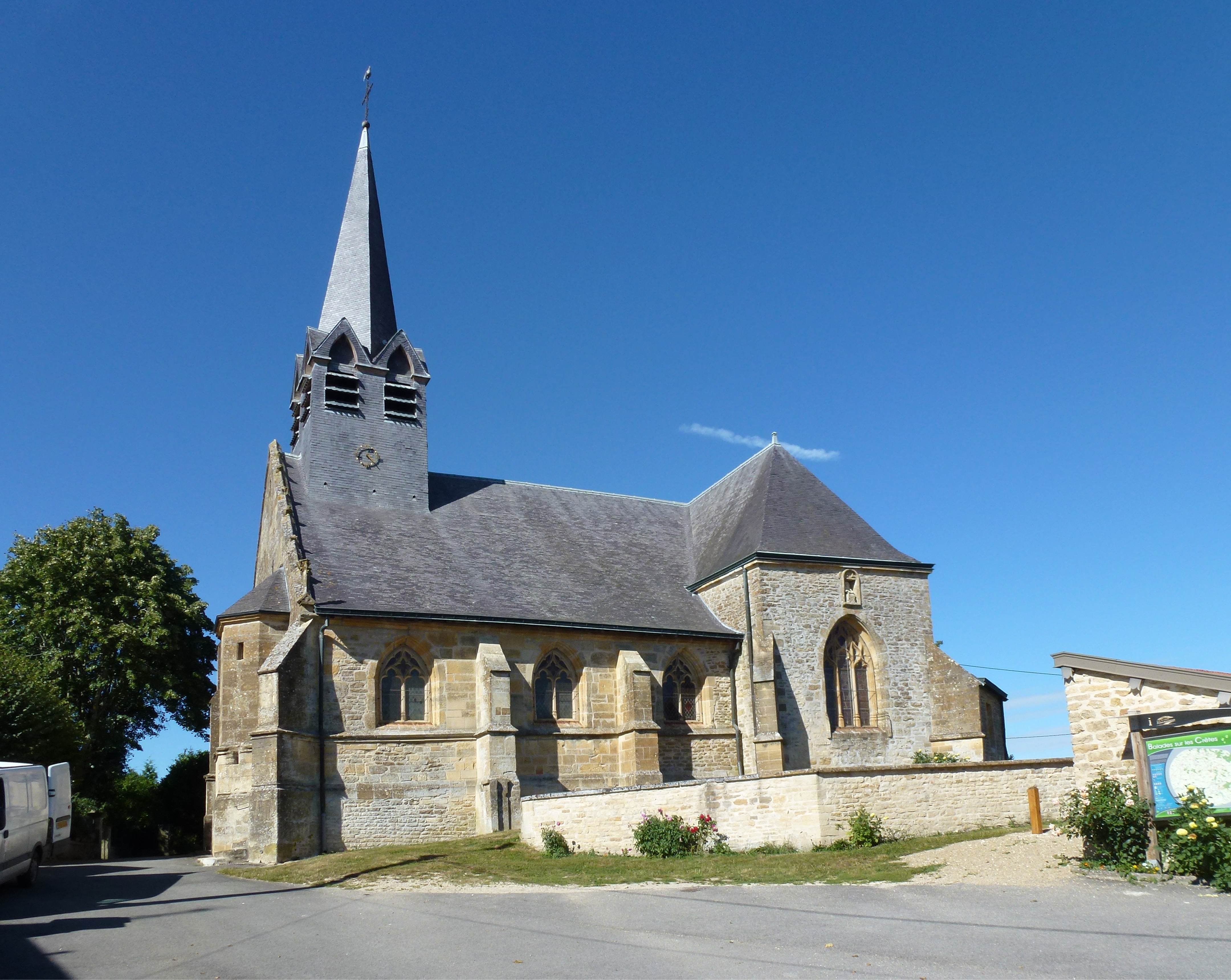 Tourteron (Ardennes) église Saint-Brice vue du sud. Construction: 13e siècle ; 15e siècle.